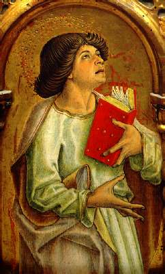 Crivelli, polittico di ascoli, dettaglio